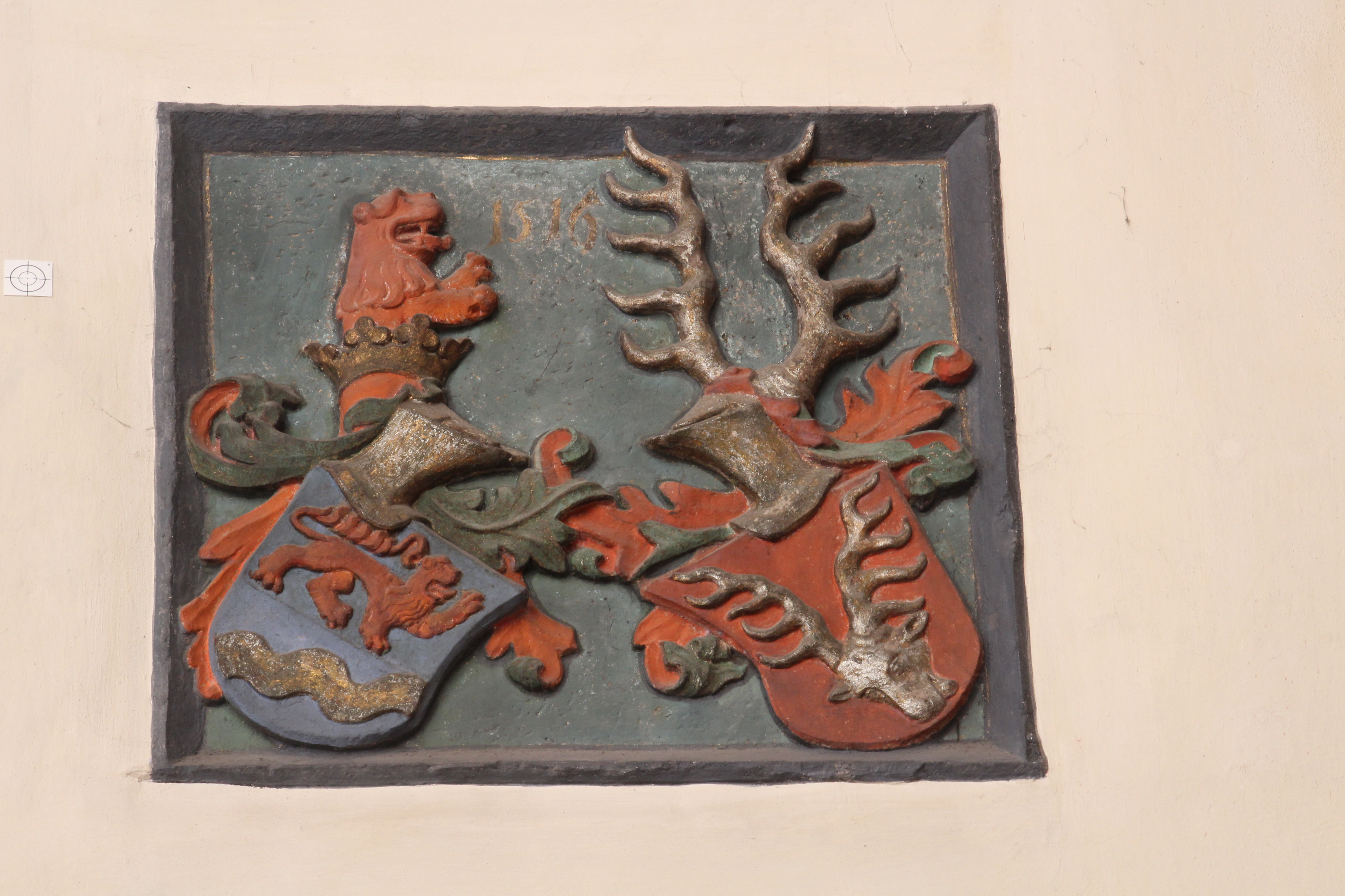 Wappen der Kirchenstifter Ratsherr Heinrich Imhoff und seiner Frau Elisabeth v. Treisbach an der Südwand. Oben zwischen Löwenkopf und Geweih die Jahreszahl 1516.